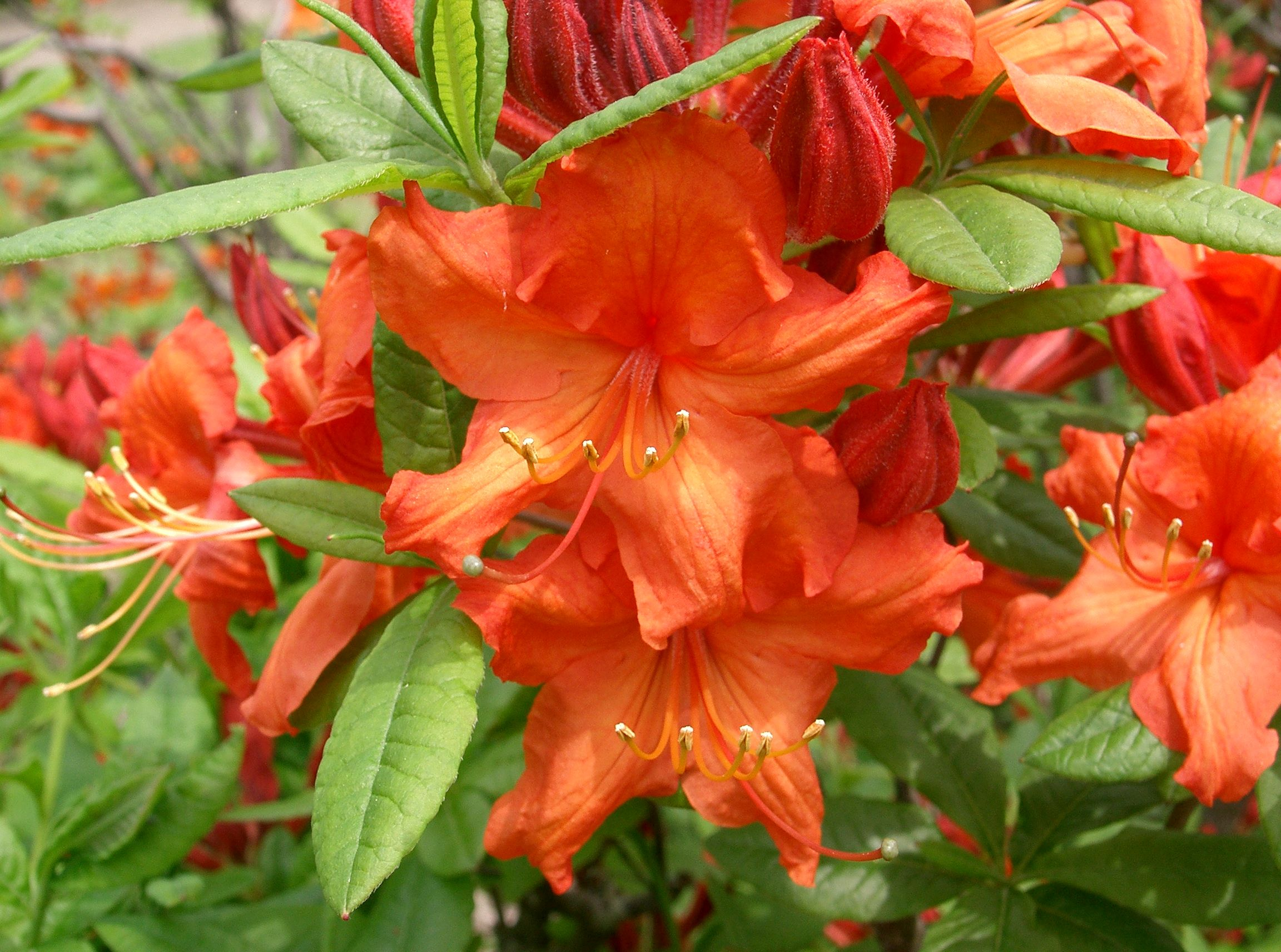 Rhododendron molle subsp. japonicum